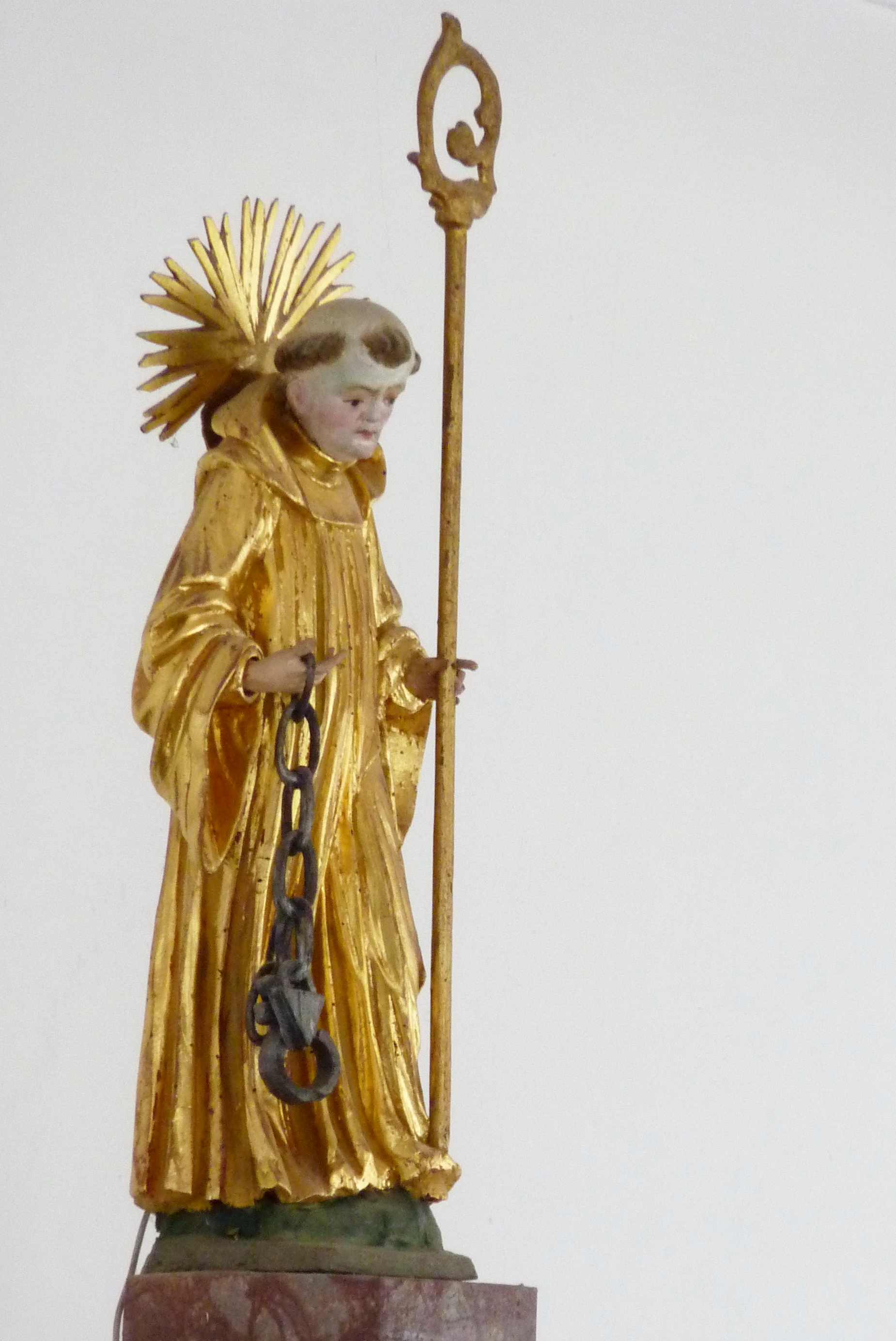 Katholische Pfarrkirche St. Leonhard in Baiershofen, einem Ortsteil der Gemeinde Altenmünster im Landkreis Augsburg (Bayern), Skulptur des hl. Leonhard